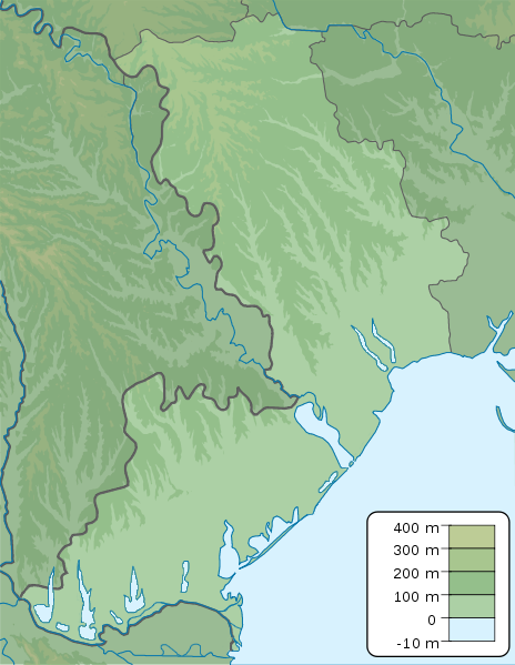 Физическая карта Одесской области, Украина, со всеми лиманами